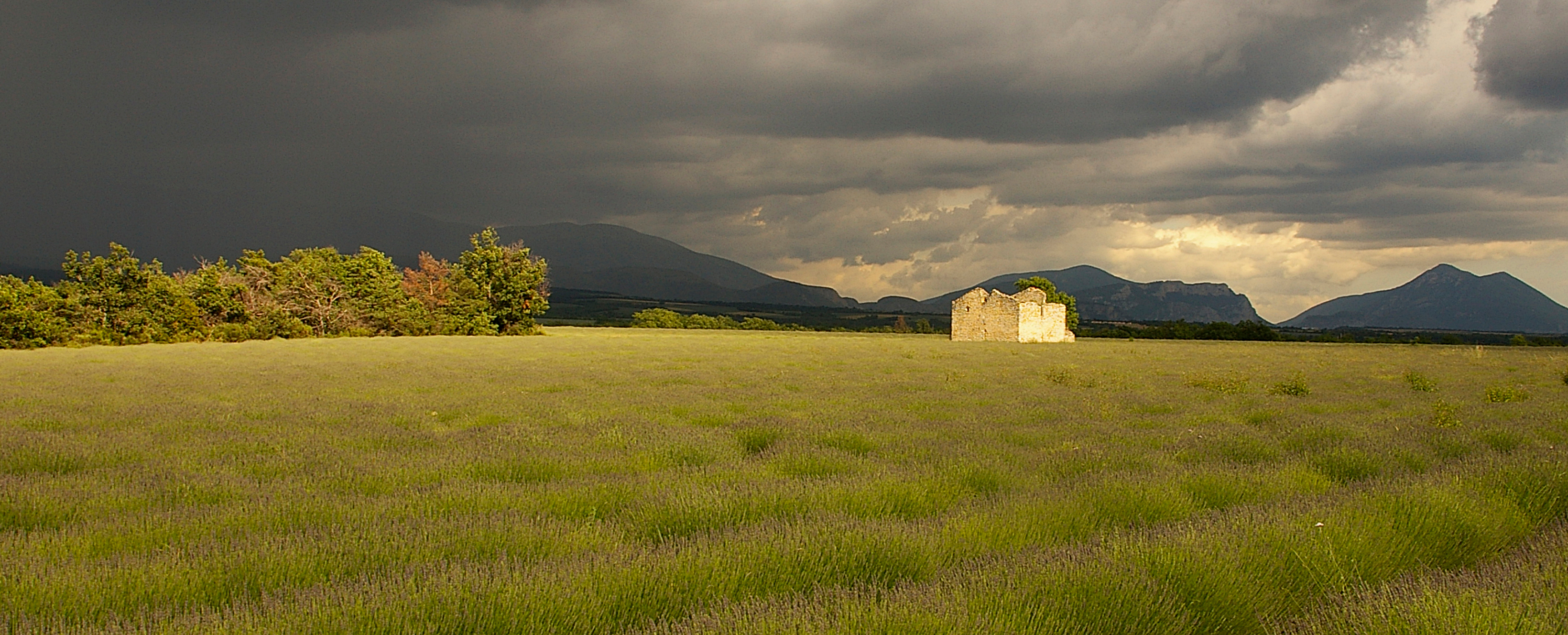 Le ciel orageux rend ces lavandes plus colorées que nature